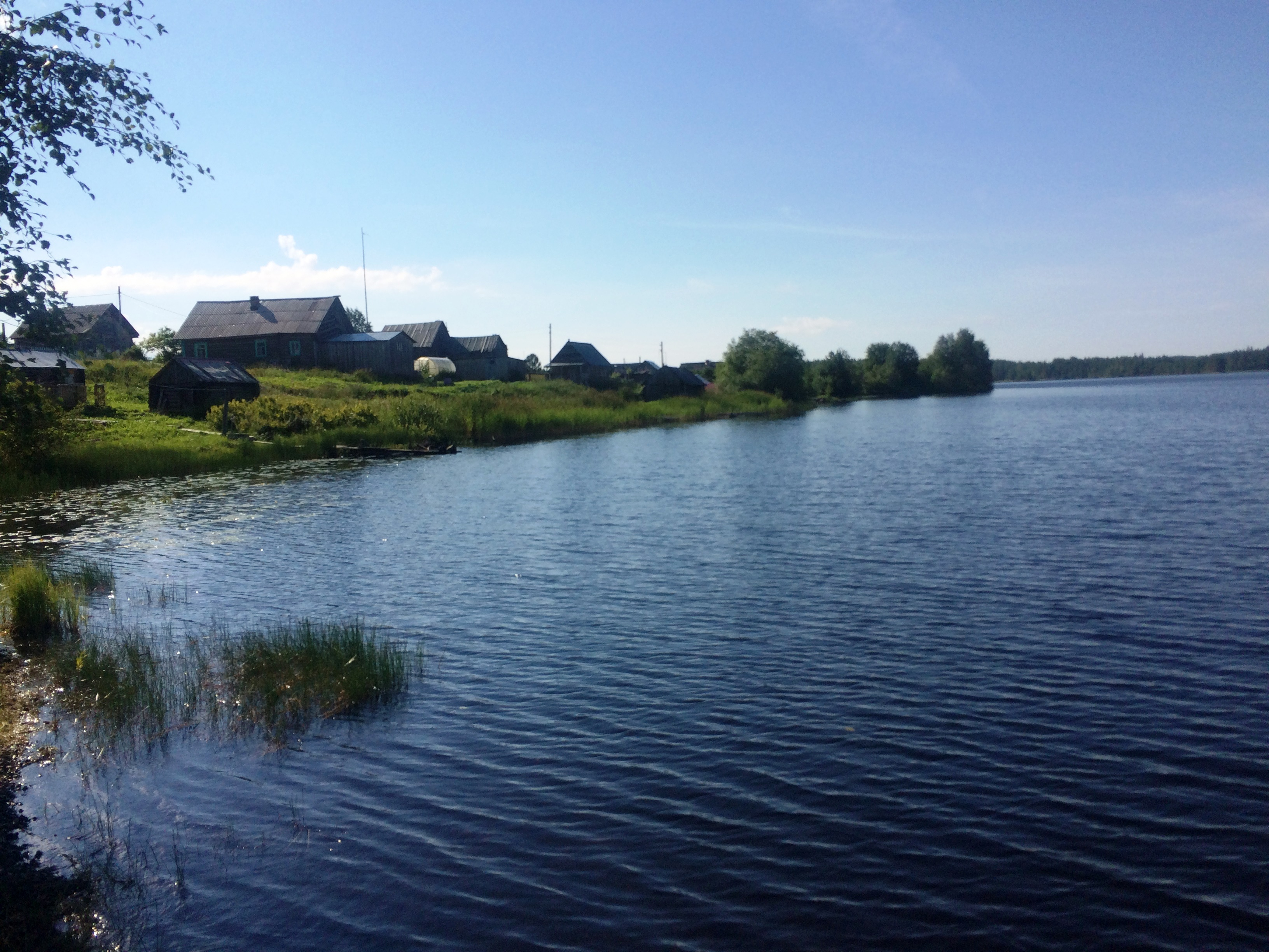 Юстозеро (деревня)